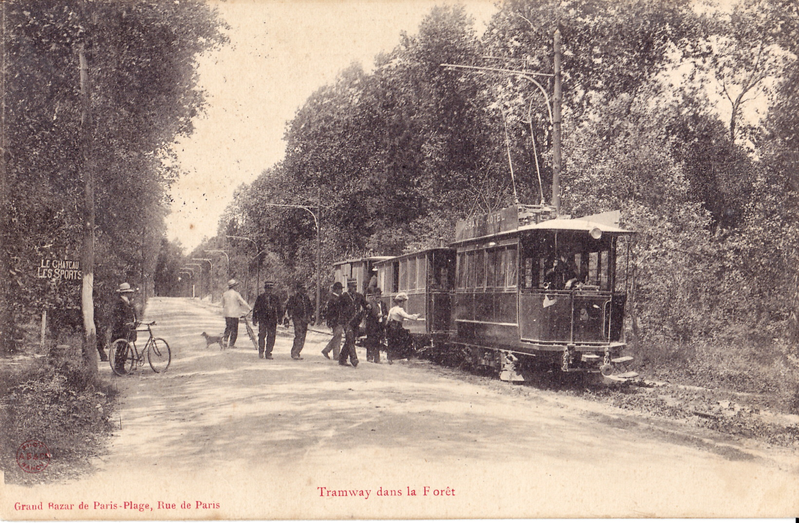 Carte postale ancienne éditée par le Grand Bazar de Paris-Plage, rue de Paris : Tramway dans la Forêt